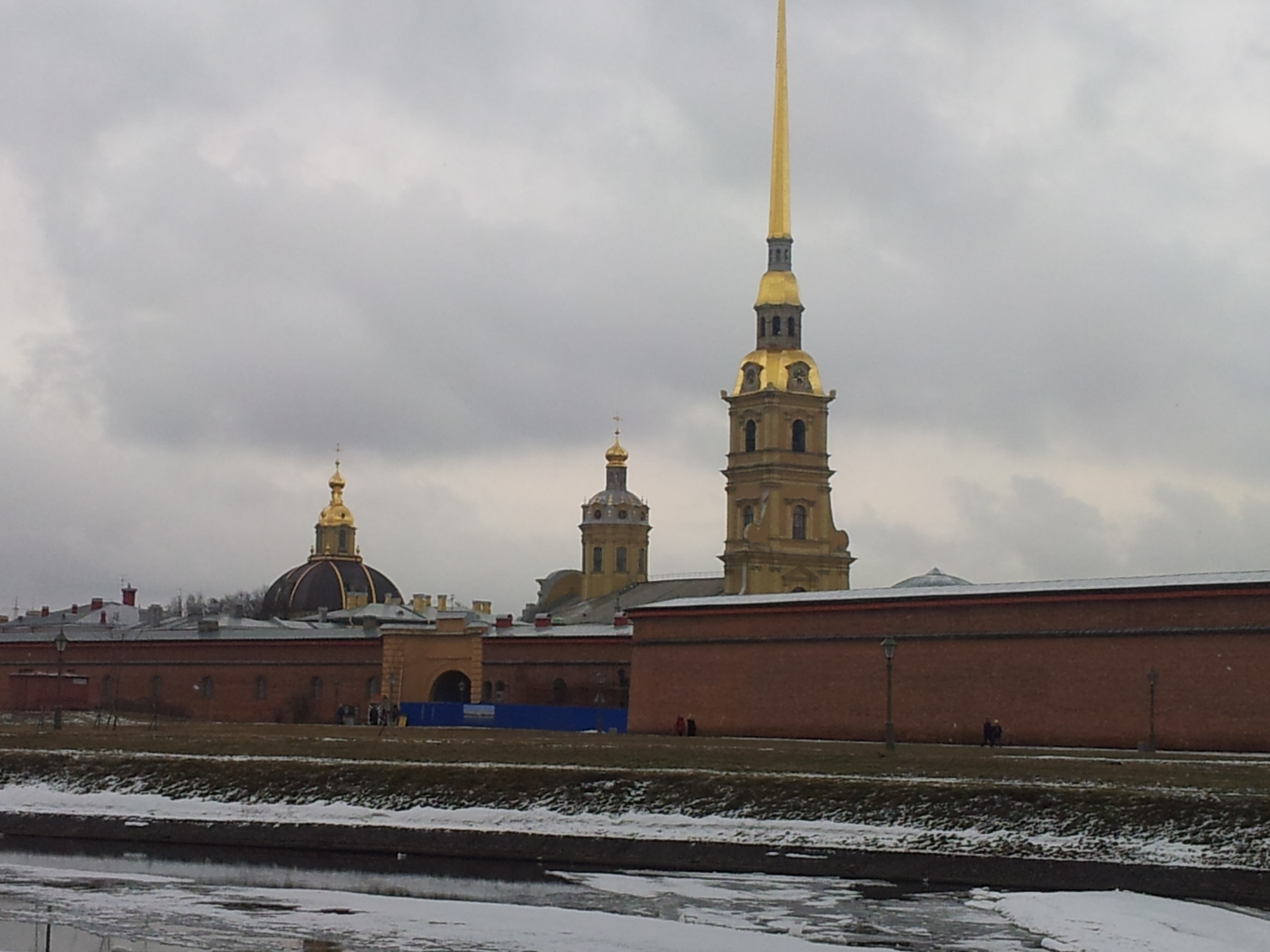 Вход в Петропавловскую крепость с северной стороны